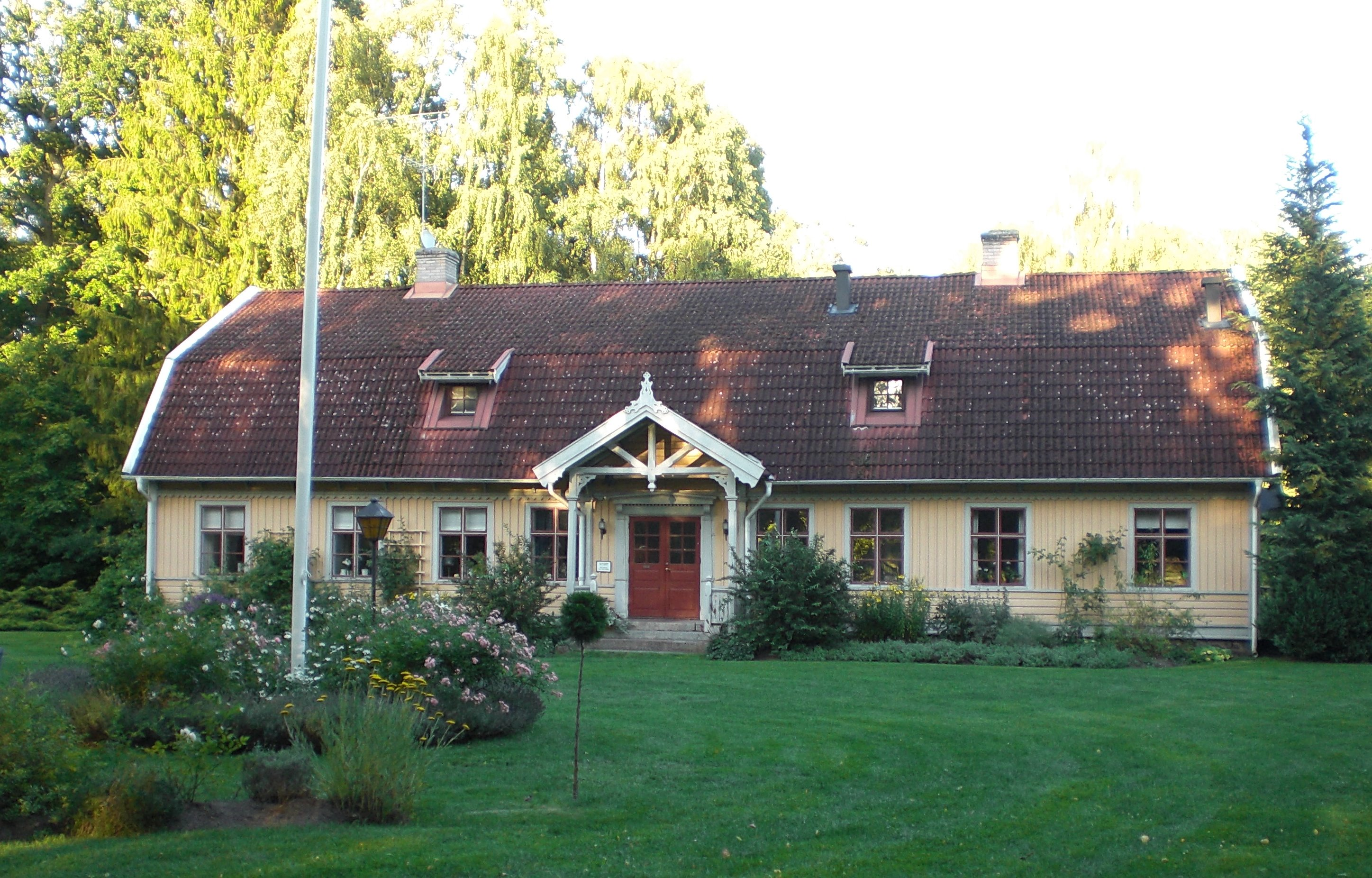 Haupthaus Skedemosse, Öland Schweden